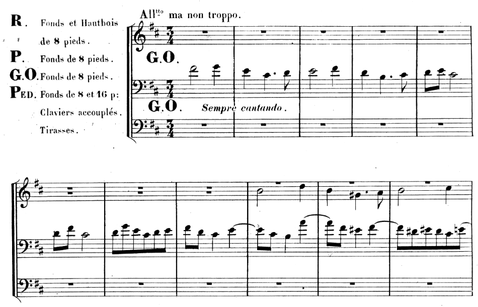 fugue